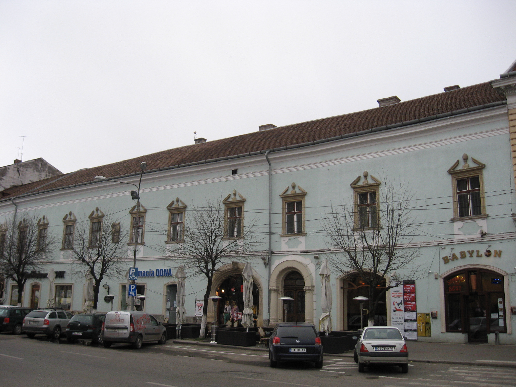 Cluj-Napoca, Parohia romano-catolică (Piaţa Unirii)